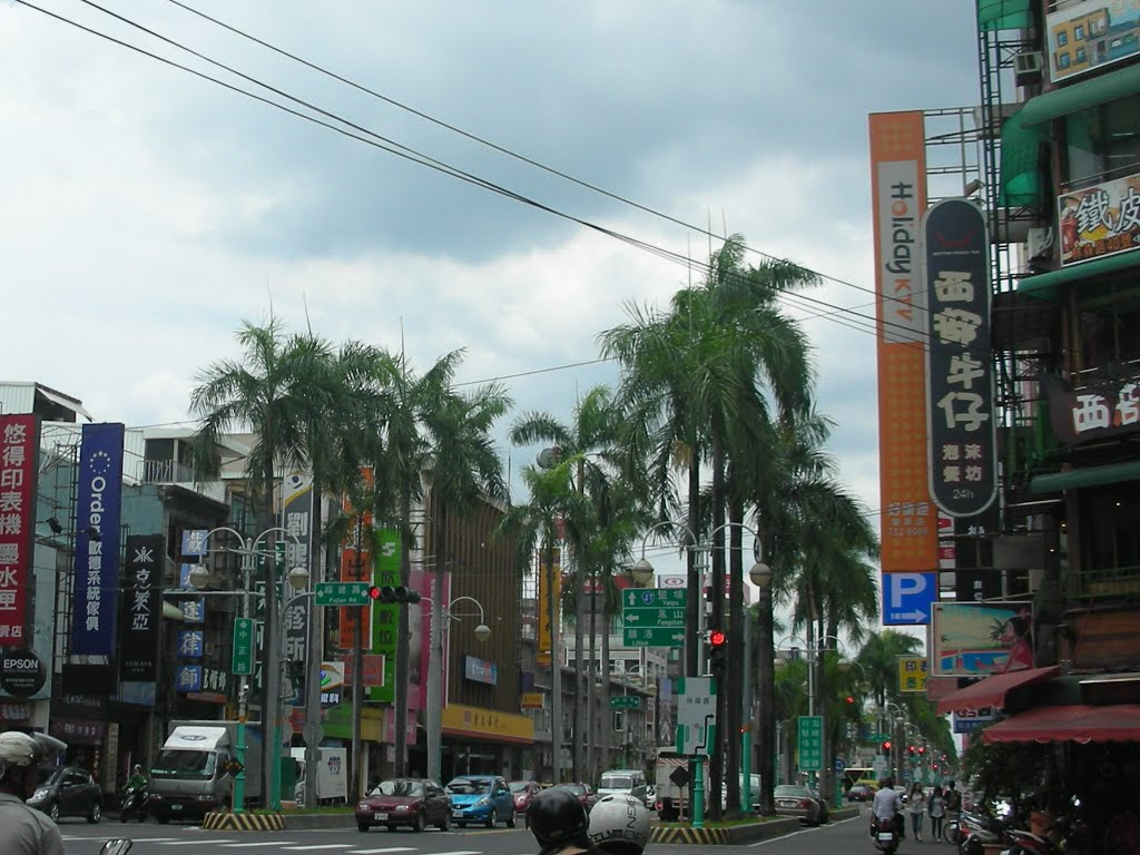 屏東市中正路街景。